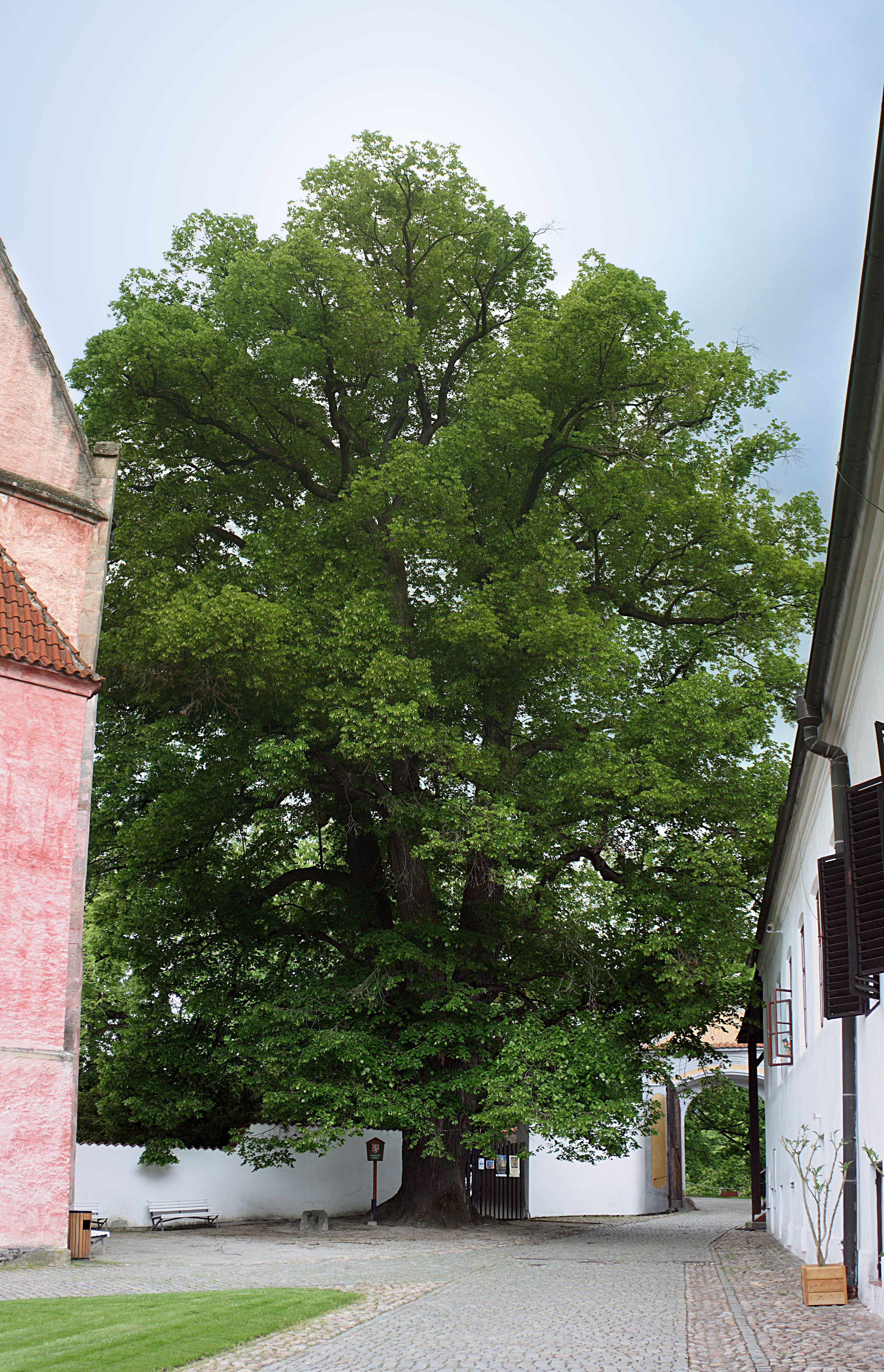 Lípa Kapucínka, stojící vedle kaple Andělů ve Zlaté koruně